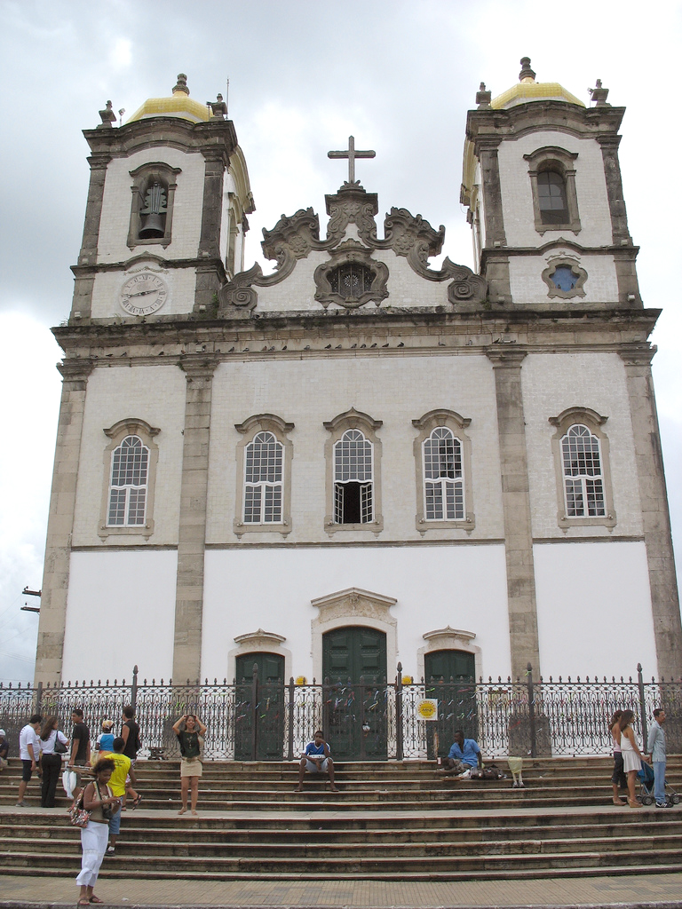 Façade of Nosso Senhor do Bonfim Church in Salvador, Bahia, Brazil